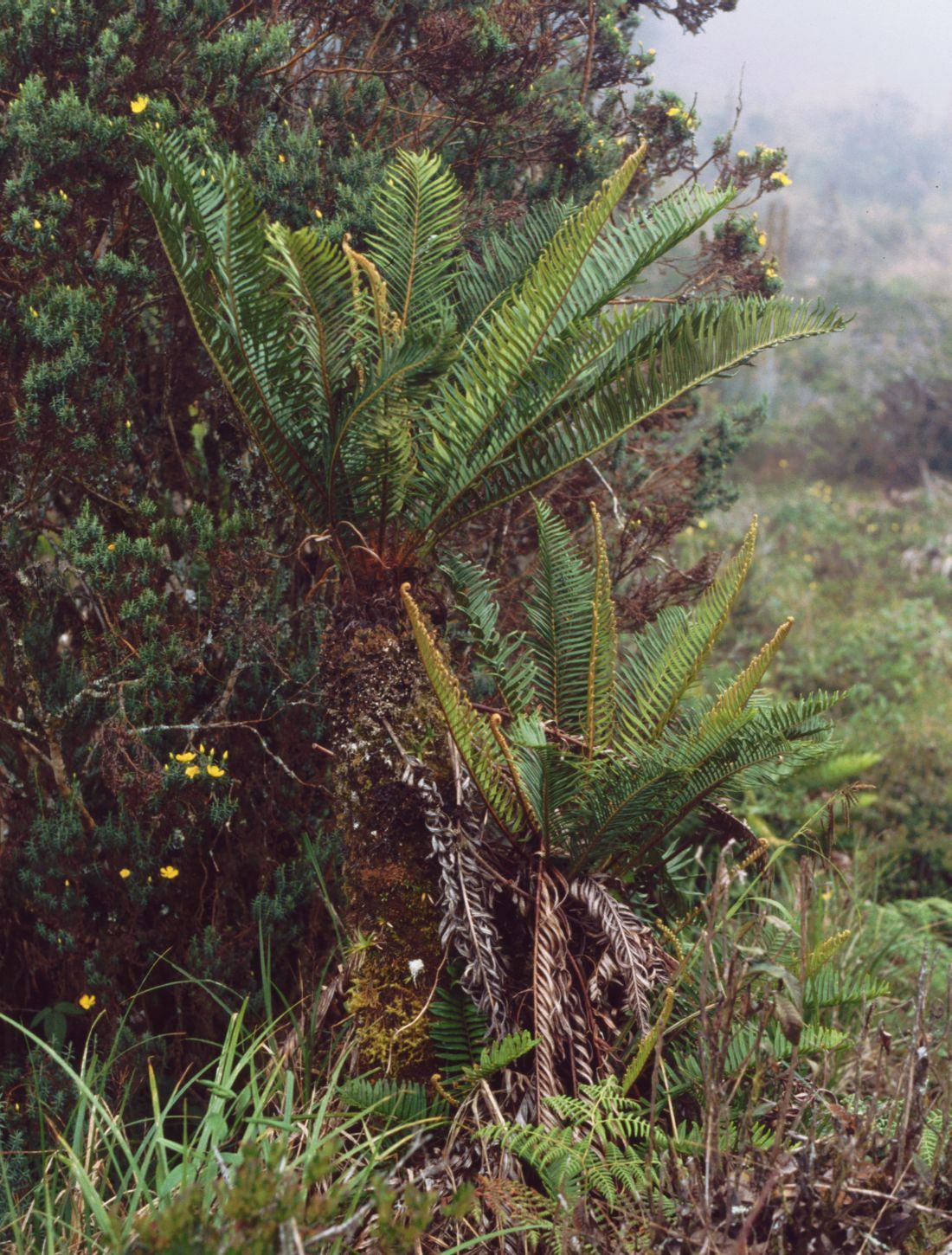 Lomariocycas aurata (= B. buchtienii), Rippenfarngewächse (Blechnaceae) - Costa Rica: Prov. Cartago, Cordillera de Talamanca, Carretera Interamericana, Madre Selva